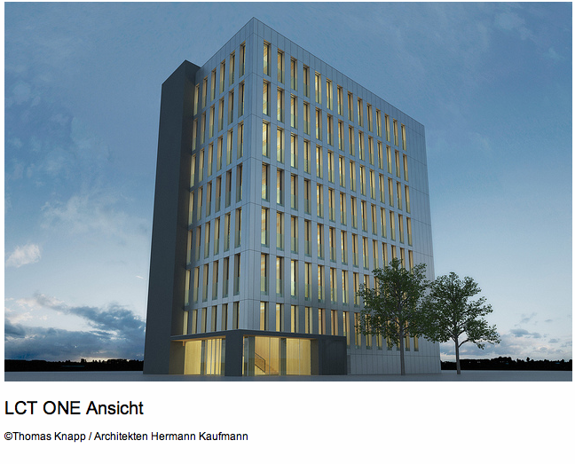 LifeCycle Tower Ansicht